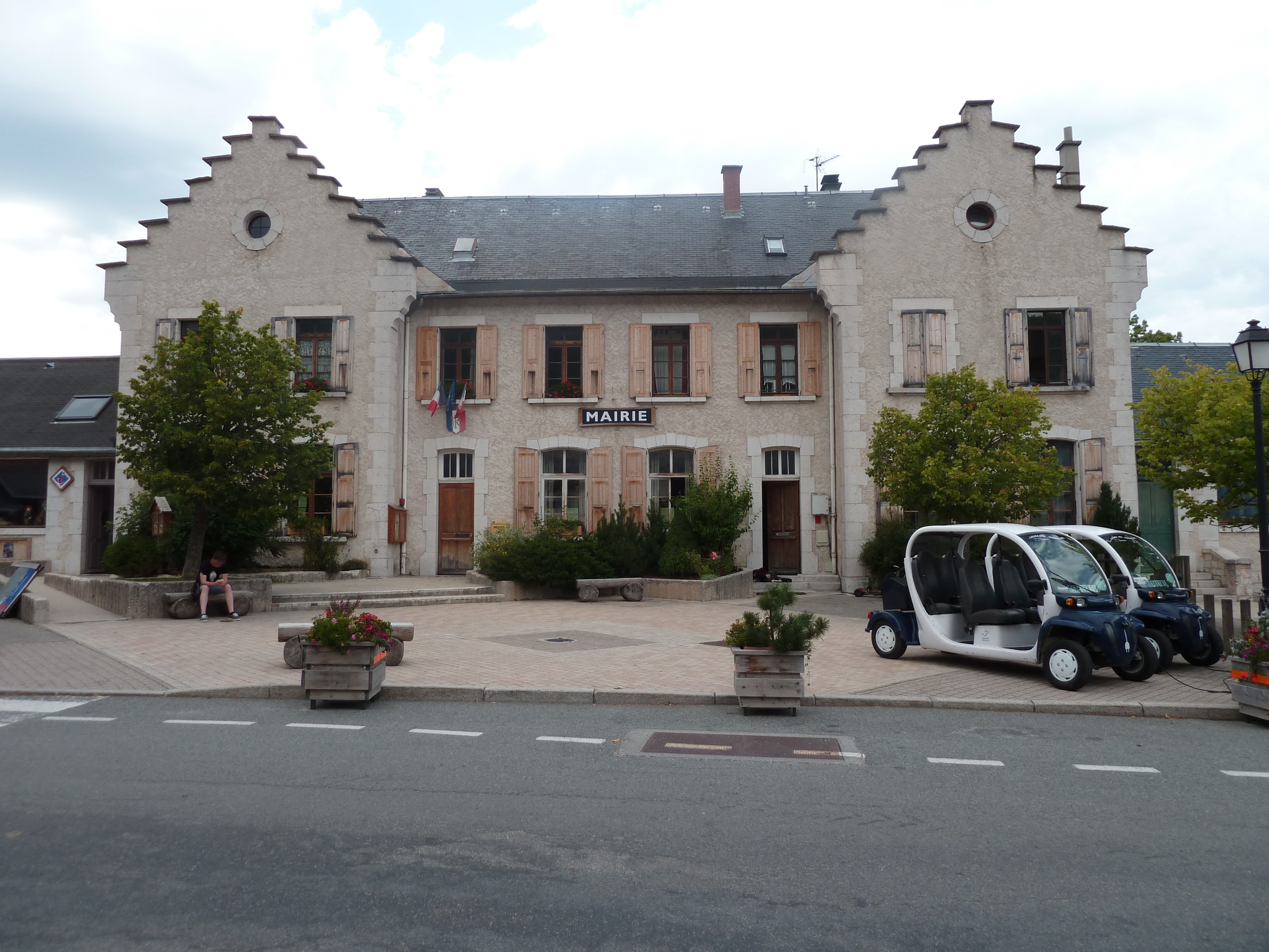 Corrençon-en-Vercors (38) : La mairie.